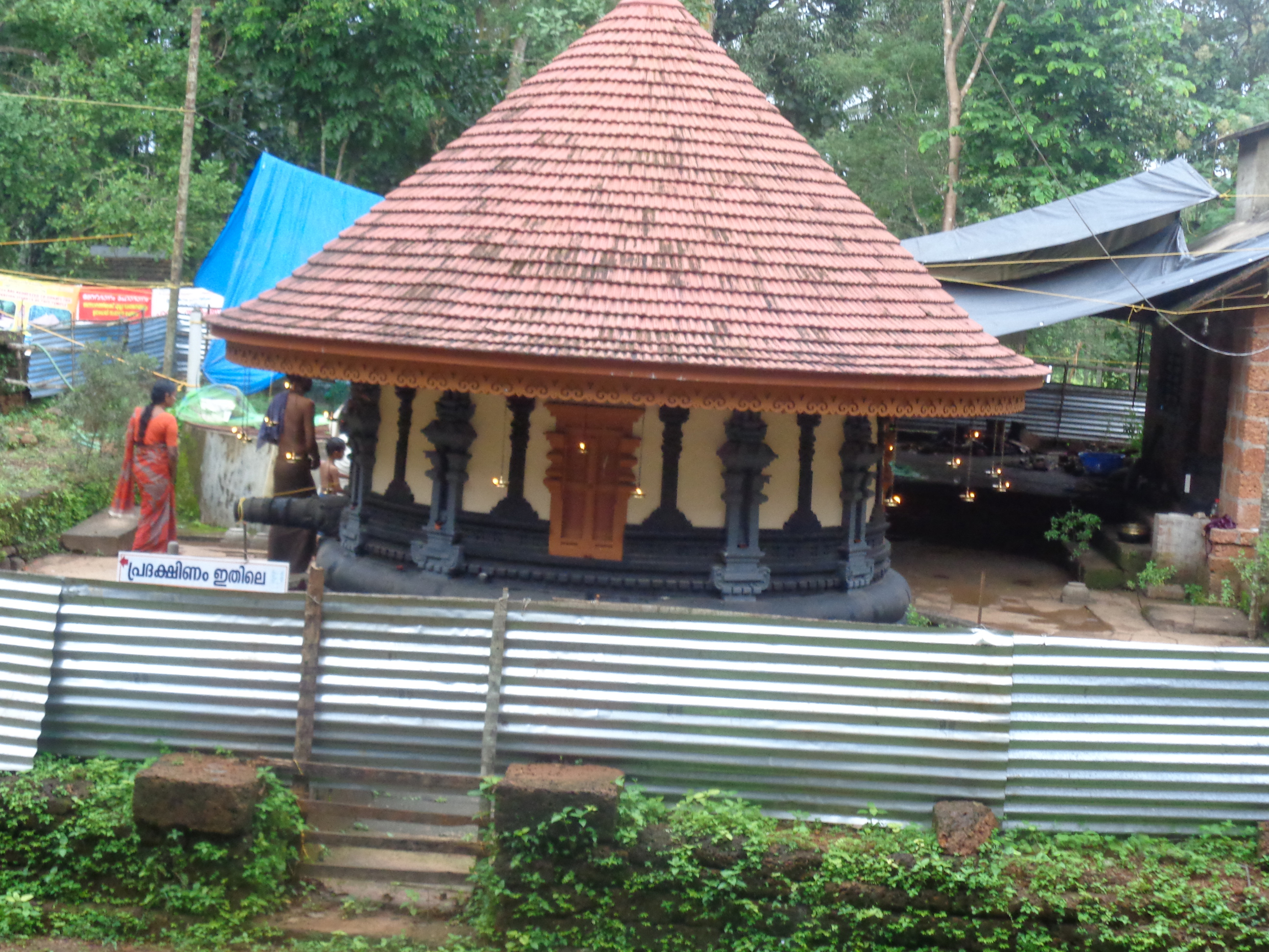 bharata temple karincha ppadi, malappuram